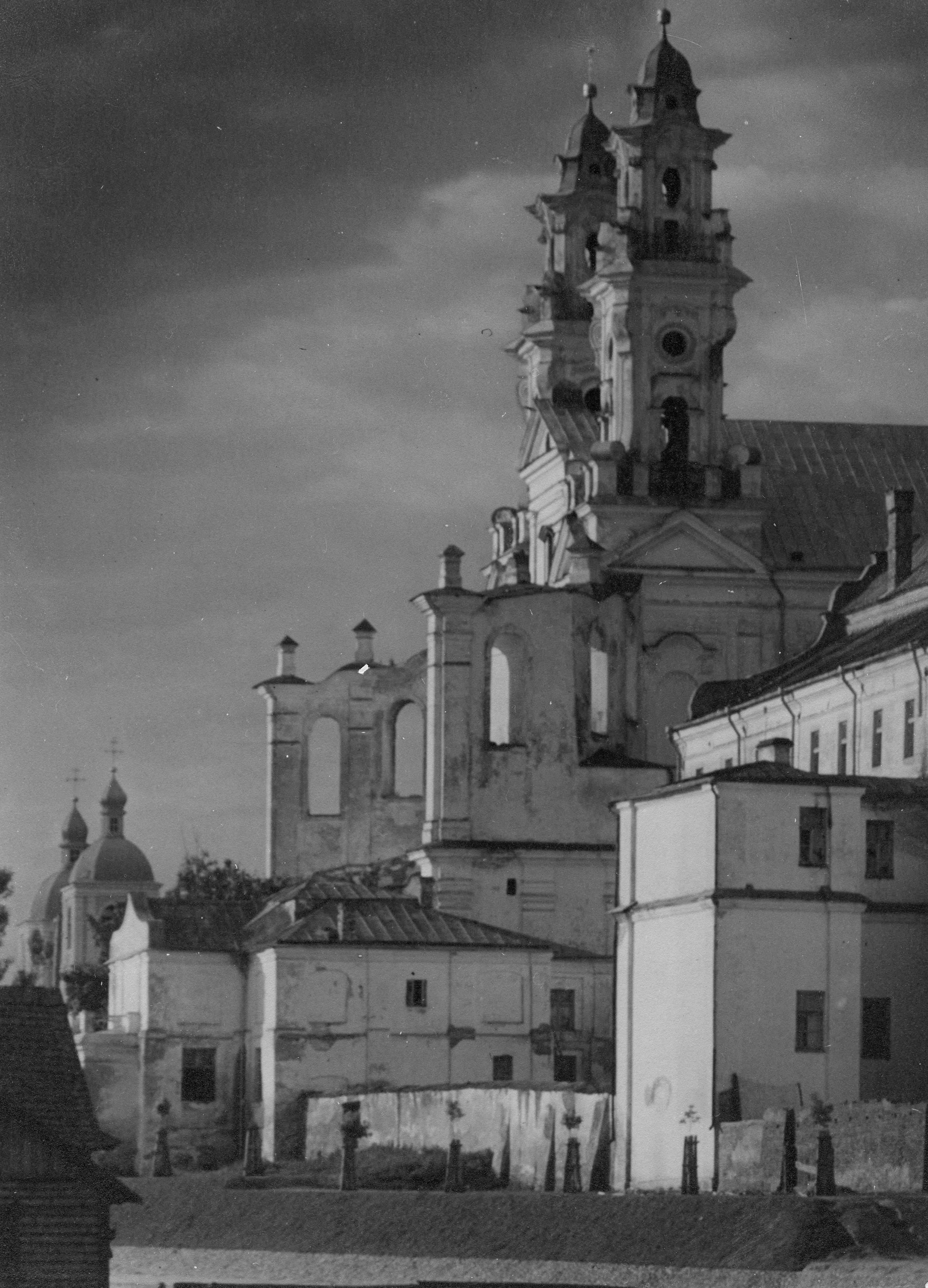 Беларуская (тарашкевіца): Пінск (Pinsk), рог вуліцы Набярэжнай (vulica Nabiarežnaja) і пляцу Рынку (plac Rynak). Касьцёл Сьвятога Станіслава і калегіюм езуітаў